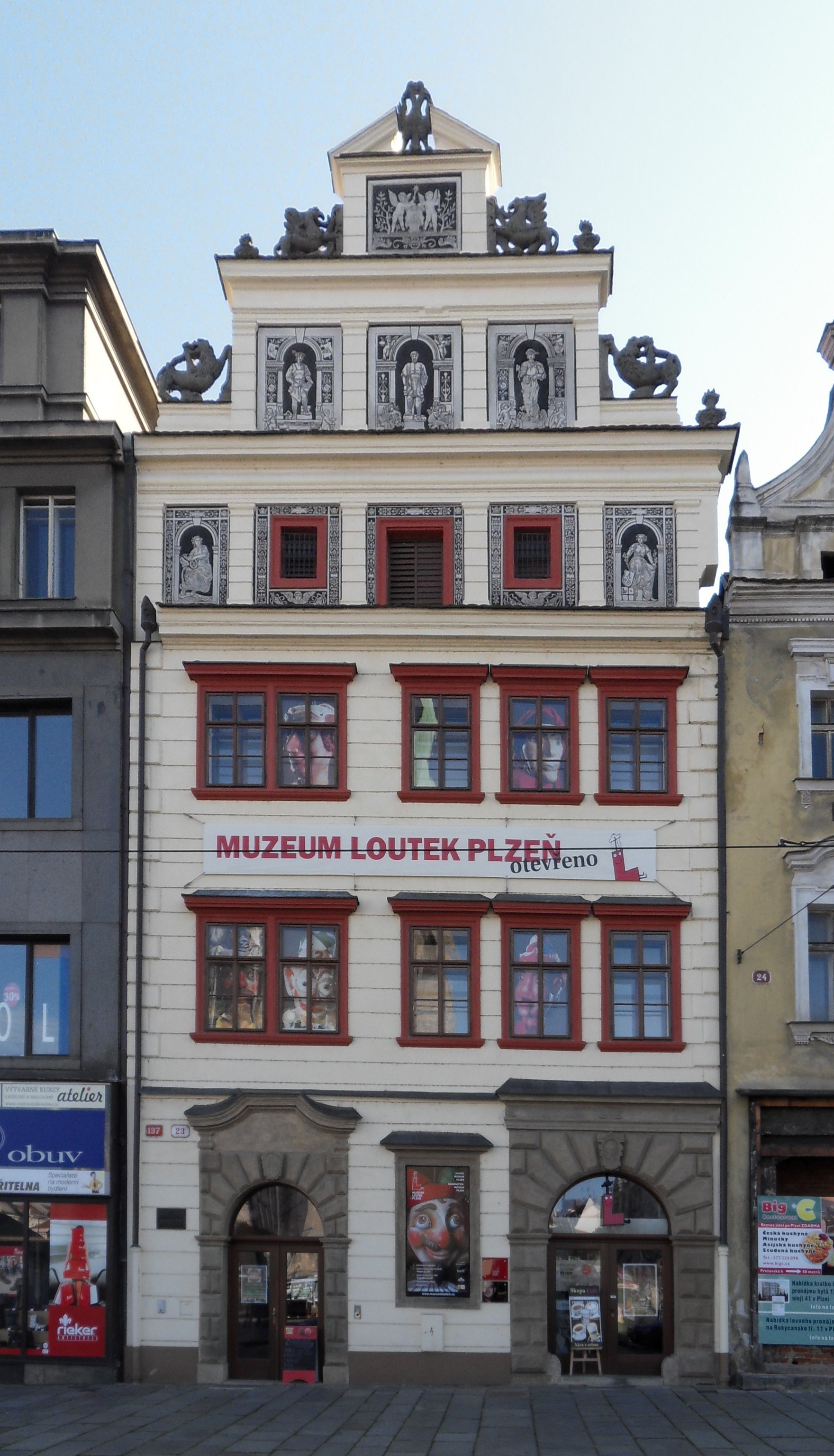 Měšťanský dům čp.137, nám. Republiky 23, Plzeň